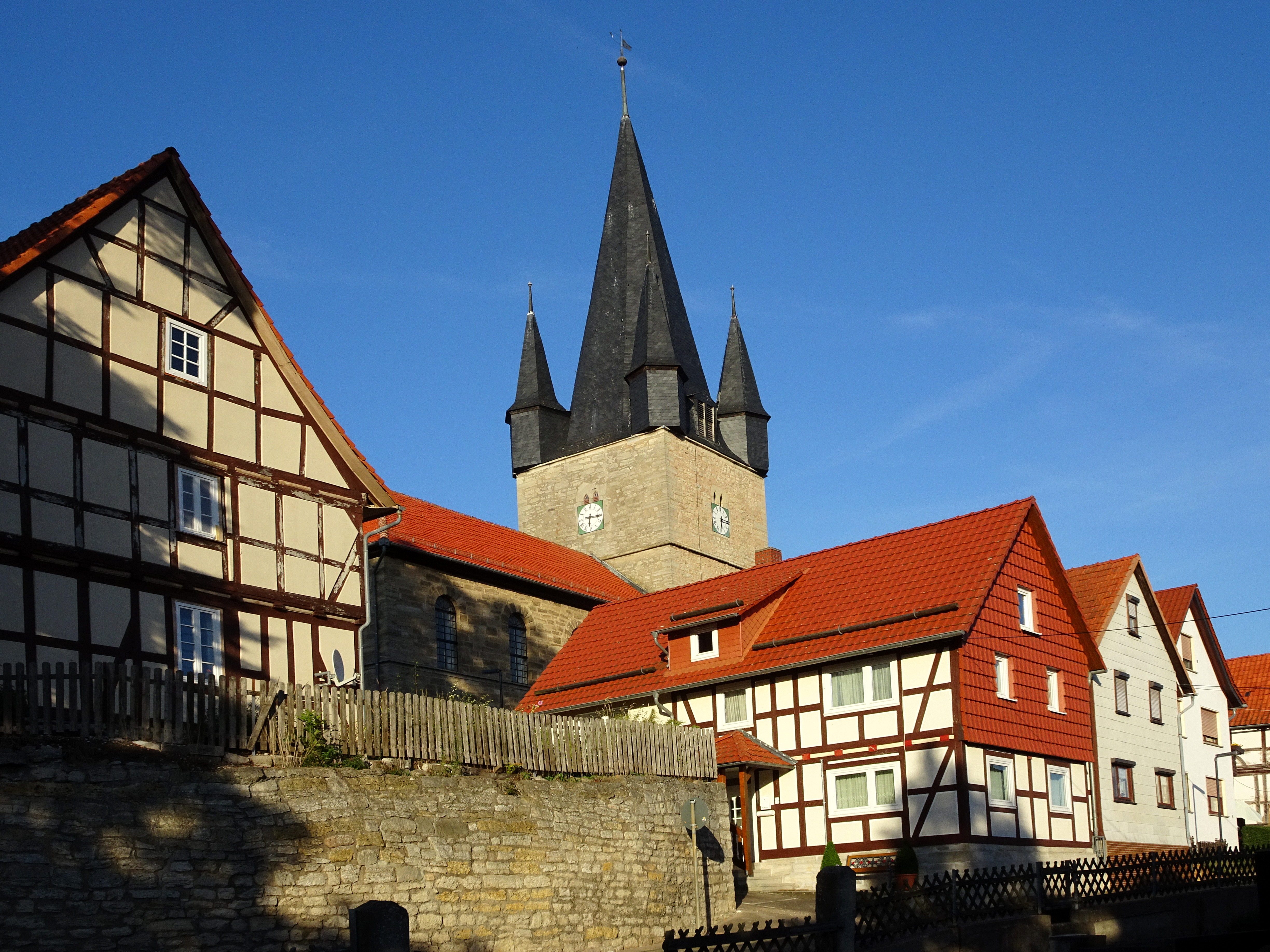 Ringgau-Netra im nordhessischen Werra-Meißner-Kreis. Blick auf die Kirche. "Die evangelische Pfarrkirche prägt mit ihrem markanten Turmhelm die Silhouette des Ortes Netra. Der um 1400 errichtete massive Turmcorpus wird von einem oktogonalen Pyramidendach geschlossen, dessen Diagonalseiten von kleinen Wichhäuschen besetzt werden. Das nach den Plänen A. J. Spangenbergs angesetzte Schiff in klassizistischem Formenkanon tritt neben dem überragenden Turm in den Hintergrund. Erst im Innenraum wird die gestalterische Qualität des Saales mit seinem hohen, von großzügig eingefügten Fenstern belichteten Inneren augenscheinlich. Diesen weiten Raumeindruck unterstreichen besonders die dünnen Stützen, zwischen die die Emporenbrüstungen verspannt sind." Text aus: Denkmaltopographie Bundesrepublik Deutschland, Kulturdenkmäler in Hessen. Werra-Meißner-Kreis I, Altkreis Eschwege. Peer Zietz, Thomas Wiegand, Braunschweig: Vieweg Verlag, 1991, ISBN 3-528-06240-1. Durch Netra führen der Herkules-Wartburg-Radwanderweg und der Elisabethpfad.